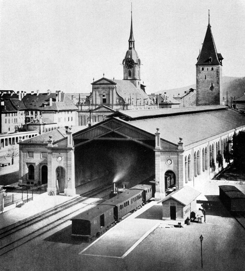 Der alte Bahnhof Bern 1860